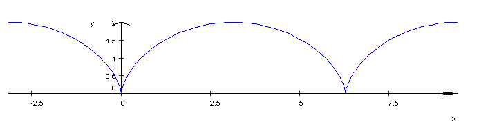 Cycloid